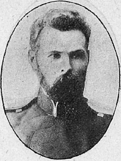 Иван Васильевич Заплатин (2 февраля 1872, Оренбургская губерния — после 1919) — подъесаул, маслоторговец, депутат II Государственной думы Российской империи от Оренбургской губернии (1907).